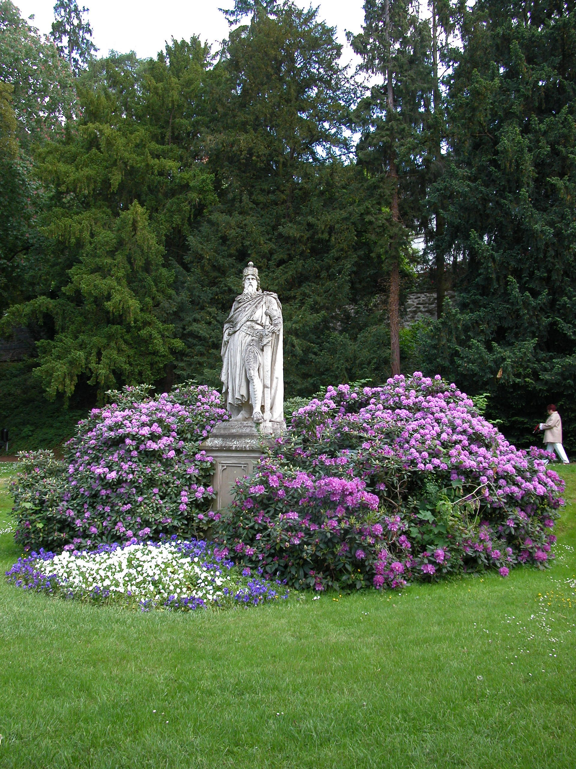 Kaiser Friedrich Barbarossa in Sinzig. Bildhauer: Wilhelm Albermann